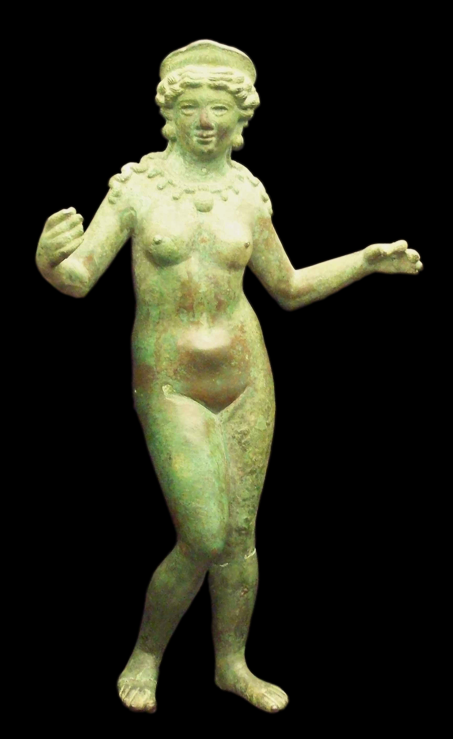 Venus